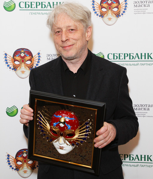 Фестиваль и премия «Золотая маска» 2012 года